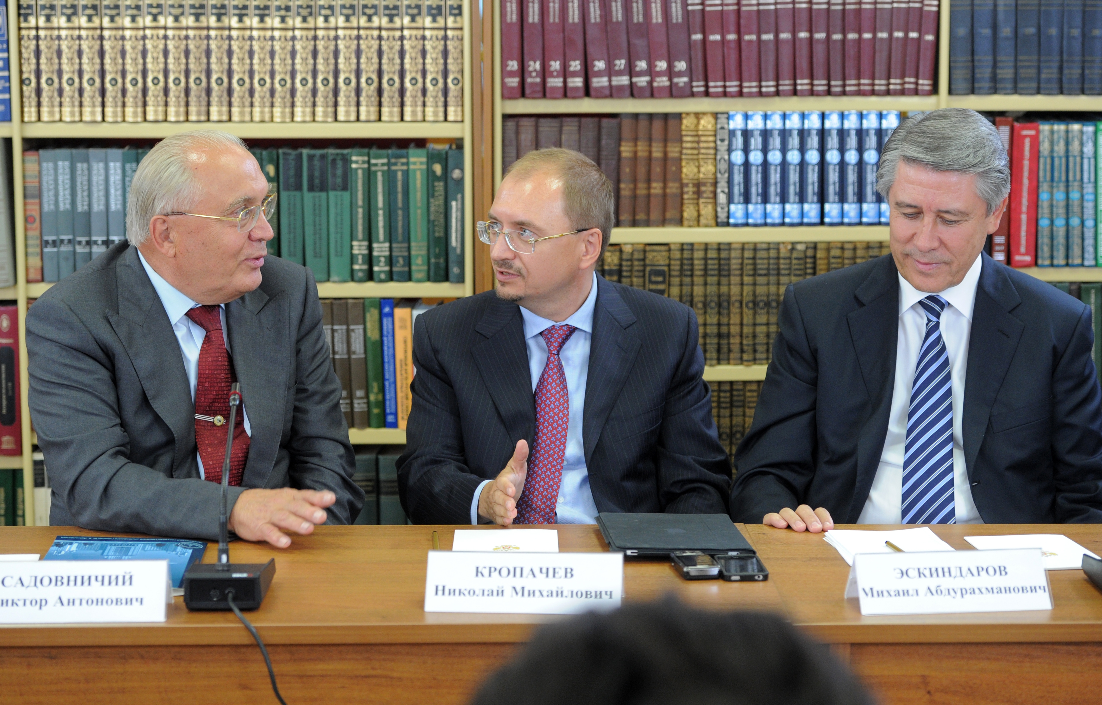 Ректор Московского государственного университета имени М. В. Ломоносова В. А. Садовничий, ректор Санкт-Петербургского государственного университета Н. М. Кропачев и ректор Финансового университета при Правительстве Российской Федерации М. А. Эскиндаров